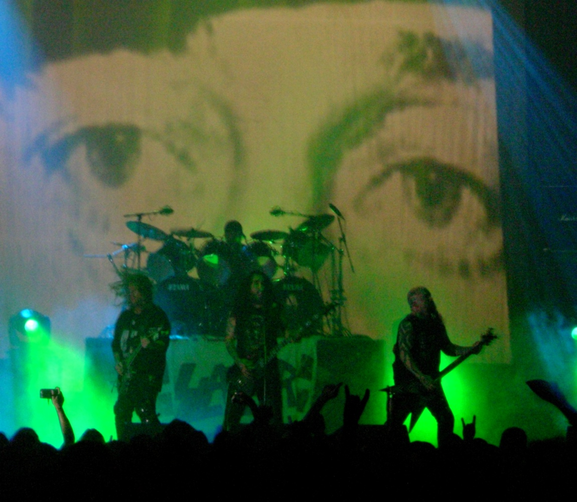 Slayer live während ihrer Tour zu „Christ Illusion“